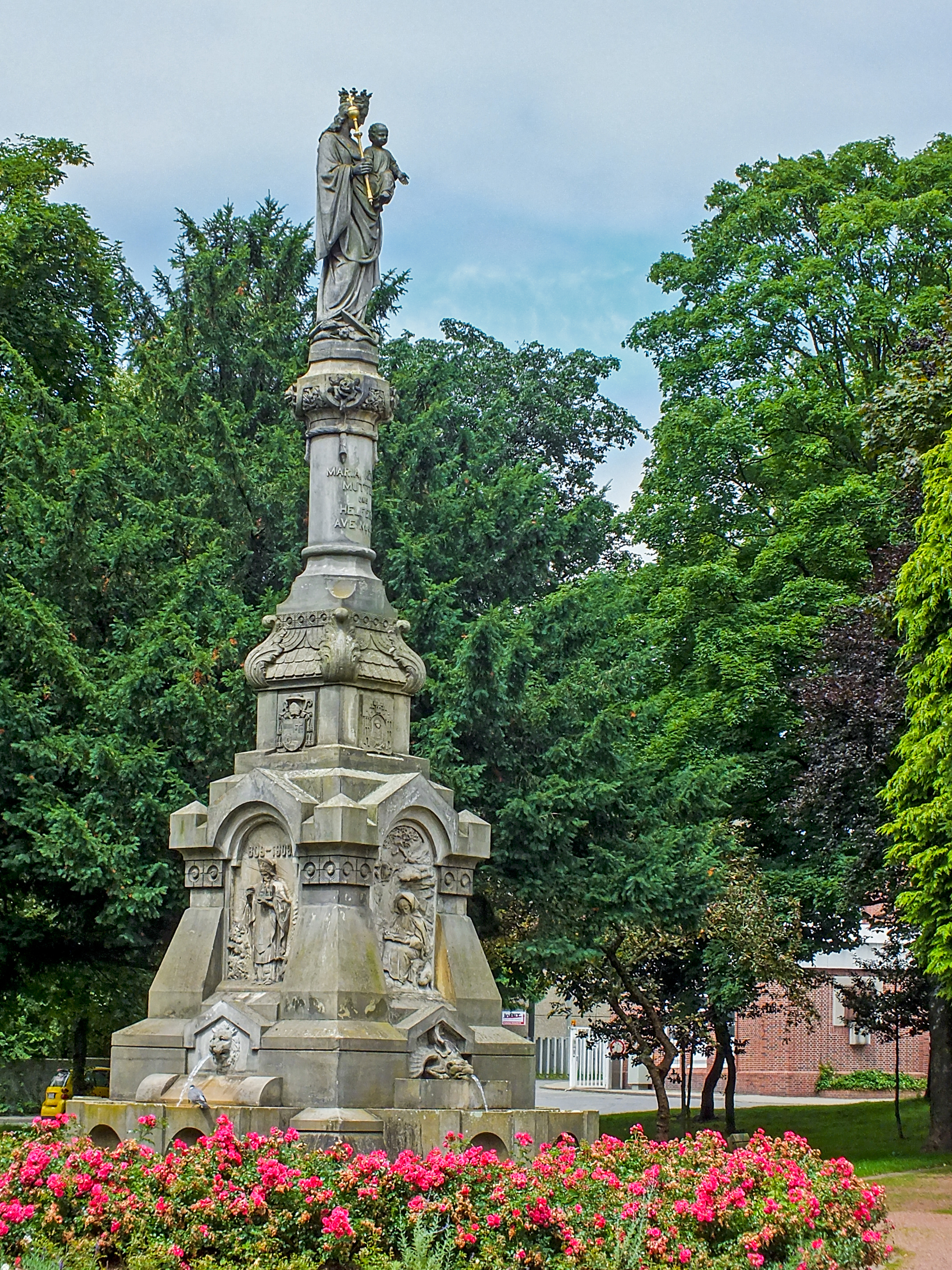 Auf dem Beckumer Marienplatz